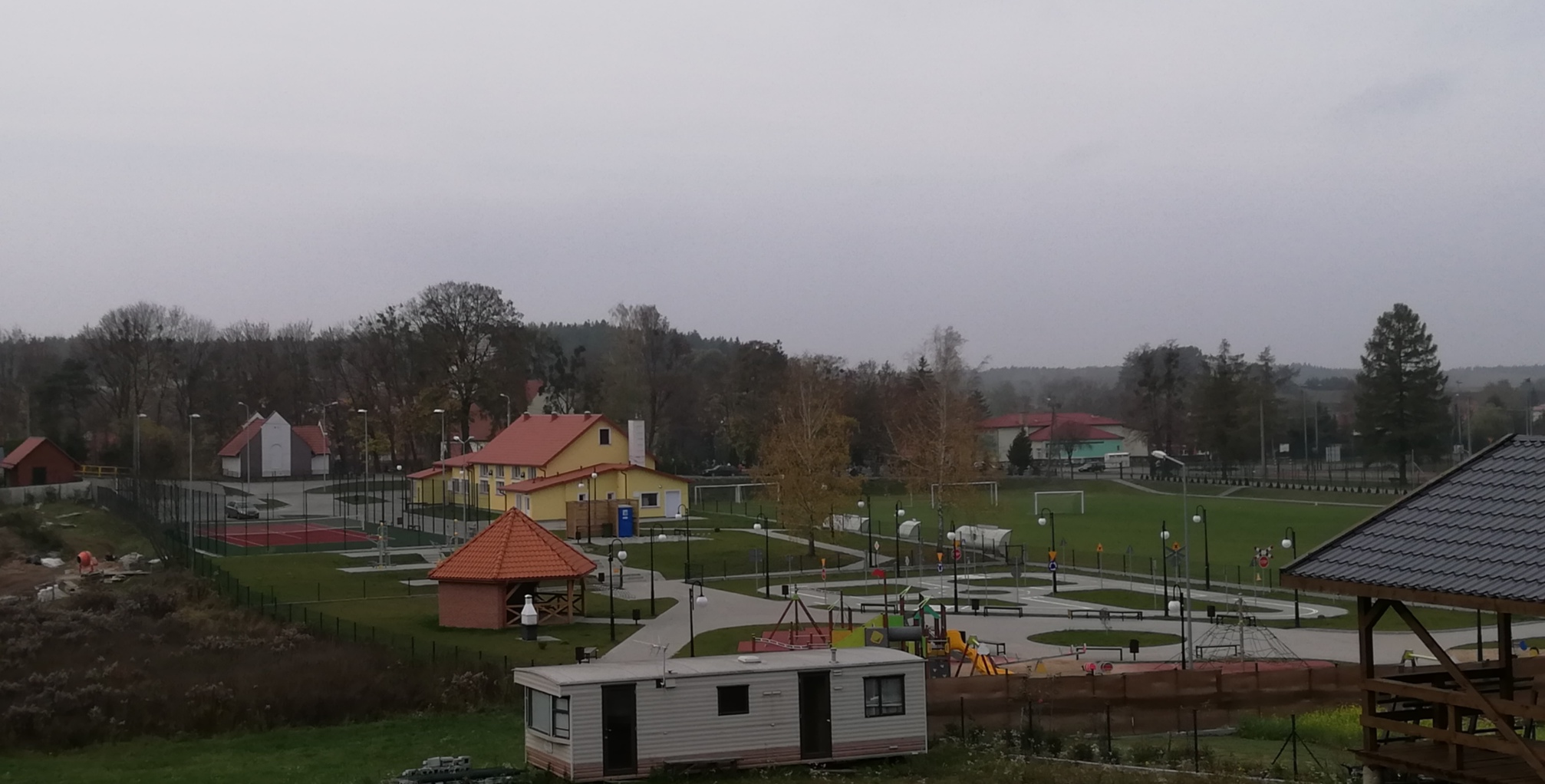 Widok na CS-R-T